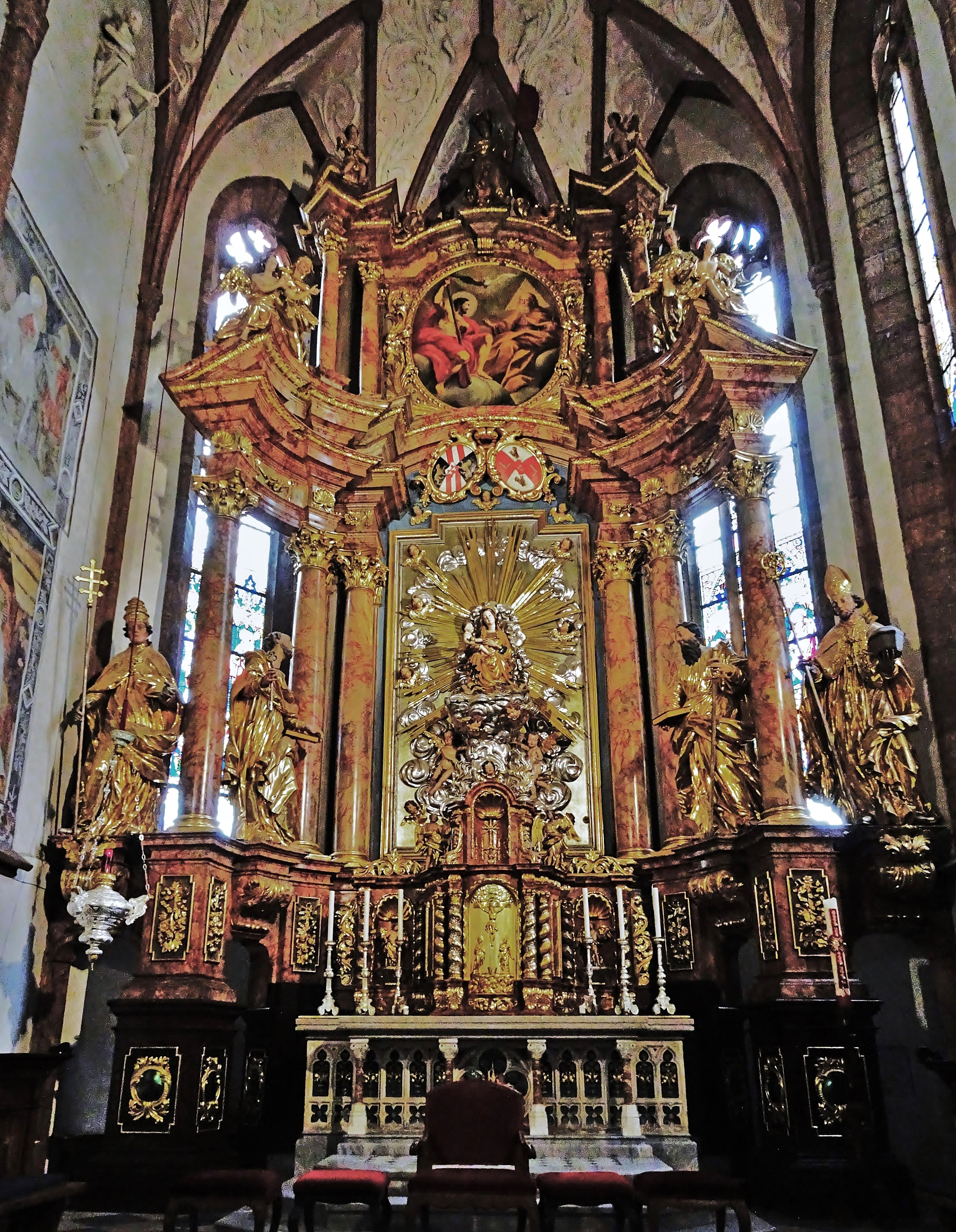 Dom zu Maria Saal, Hochaltar